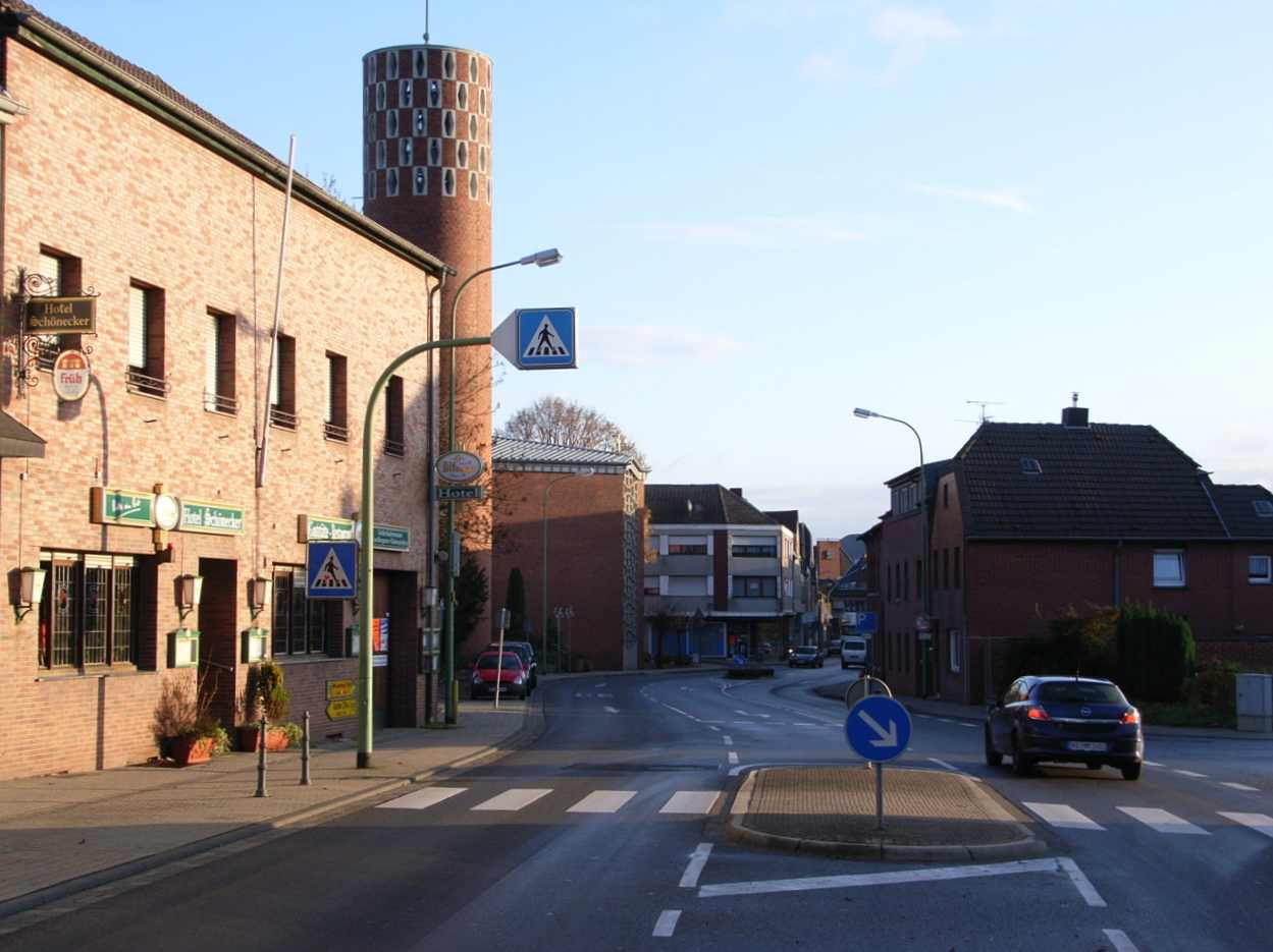 Baesweiler-Setterich B57 Ortsdurchfahrt